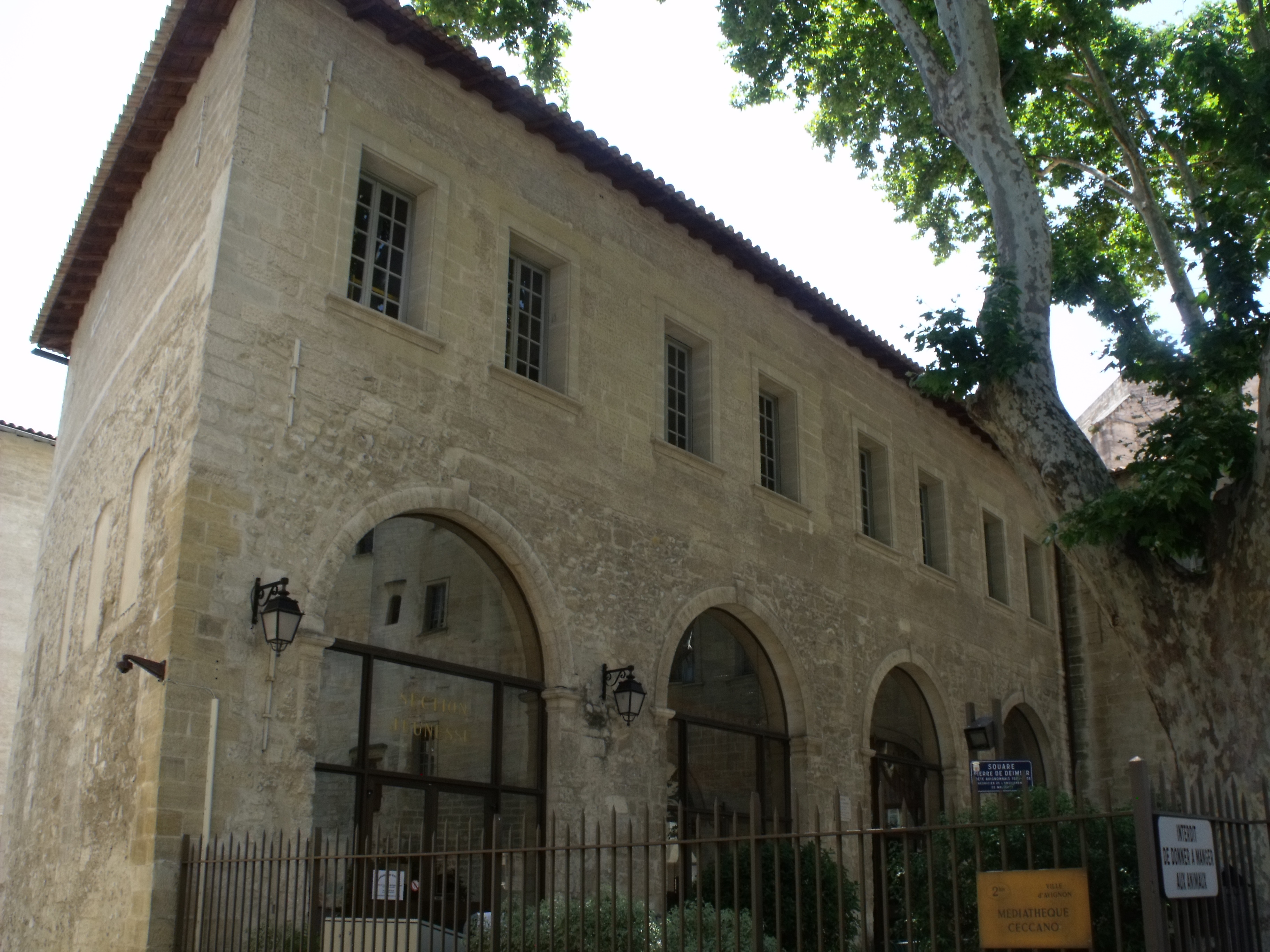 Ancienne livrée Annibal de Ceccano devenue la Médiathèque Ceccano d'Avignon